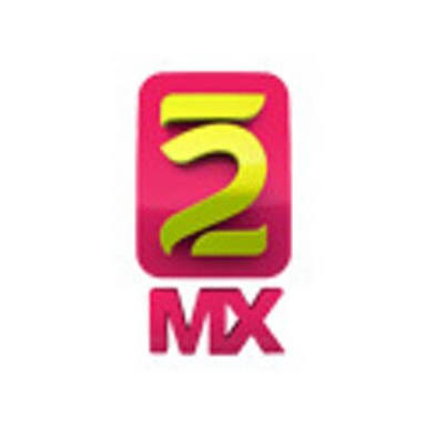 Canal